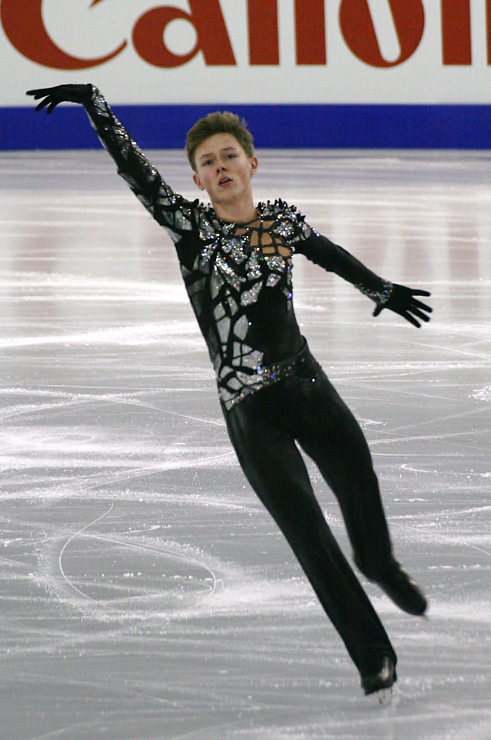 Александр Петров (Россия) на финале Гран-при среди юниоров 2014-2015.